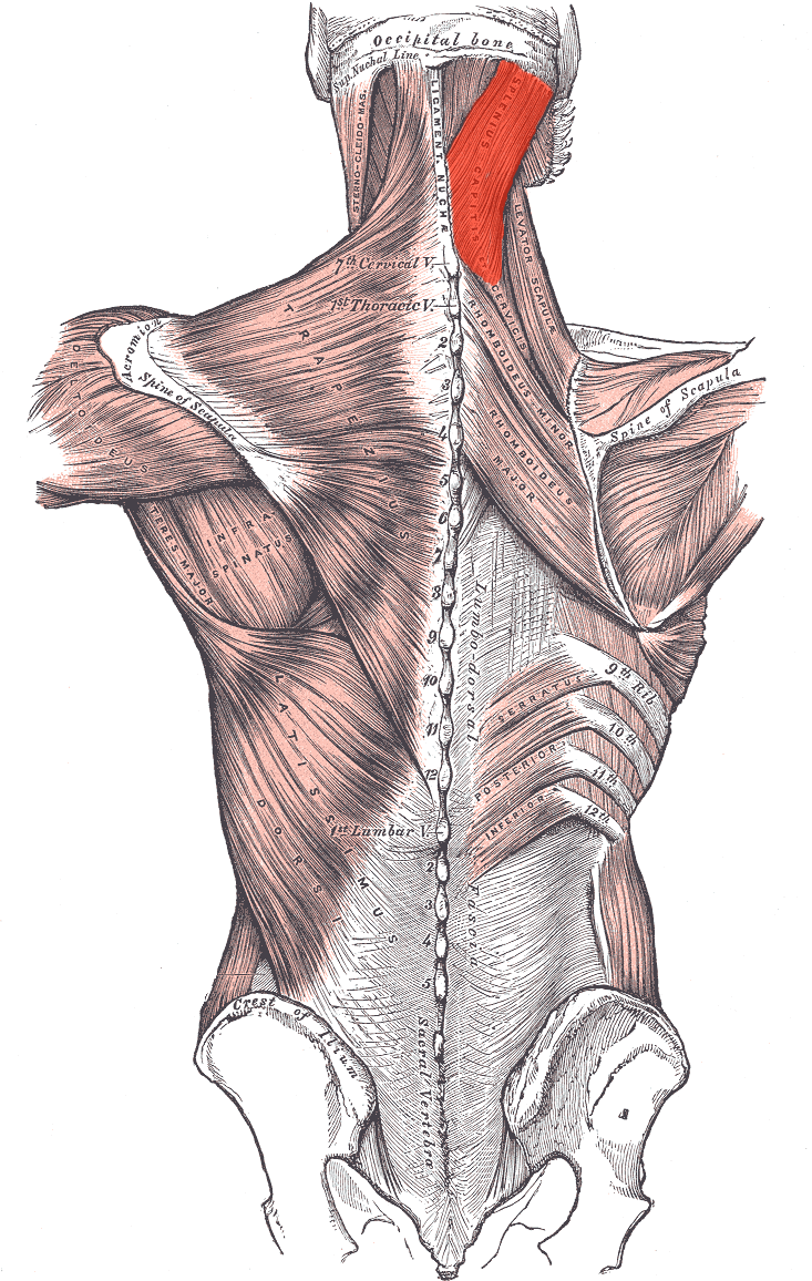 Splenius muscle